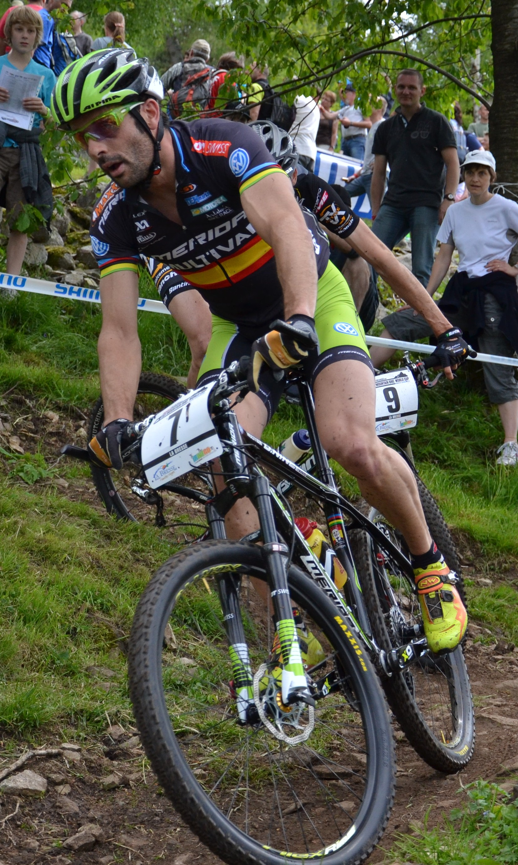 José Antonio Hermida lors de la 4e manche de la coupe du monde UCI de VTT 2012 à La Bresse (FRA).